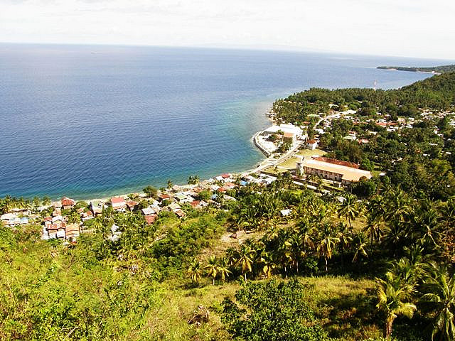 Boljoon poblacion, Cebu, Philippines